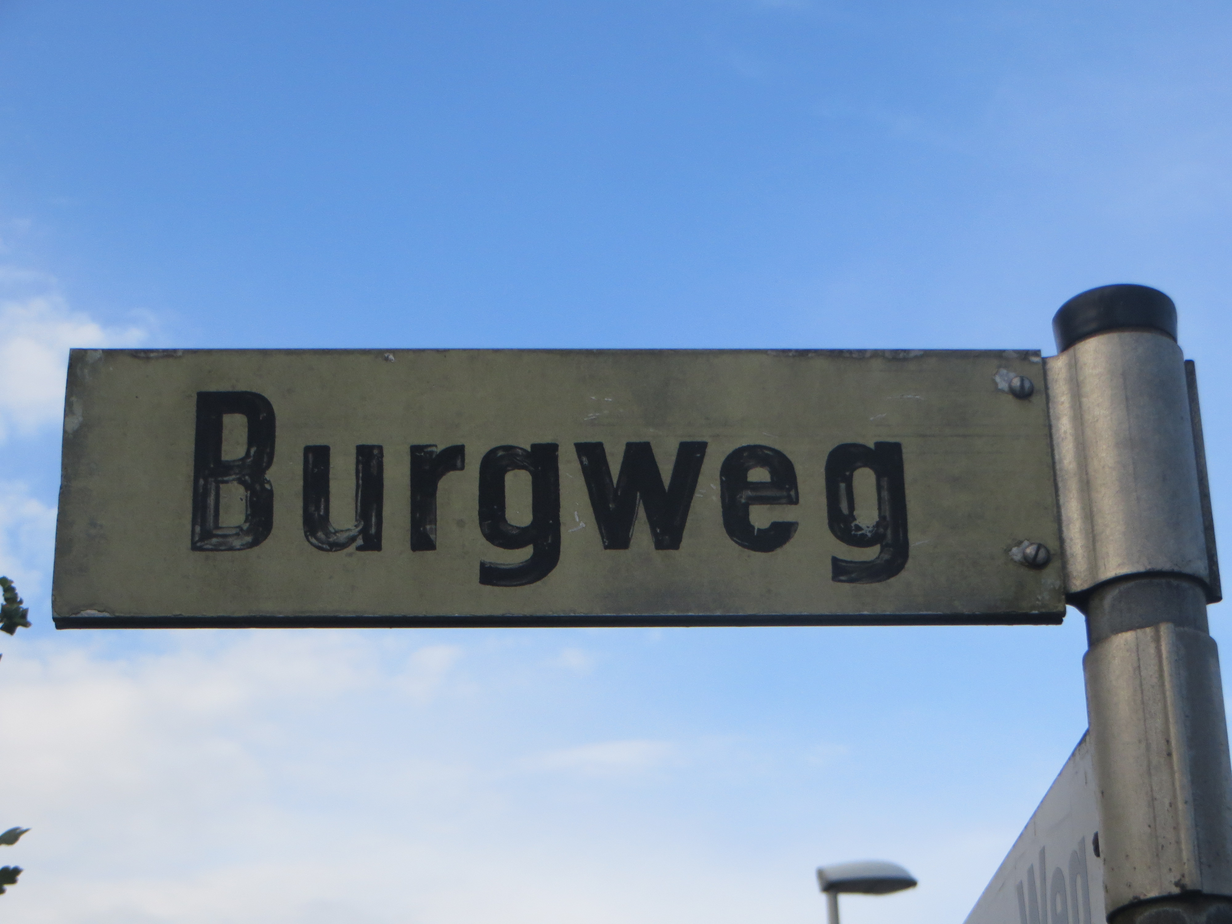 Straßenschild Burgweg (Flensburg-Weiche), Bild 04